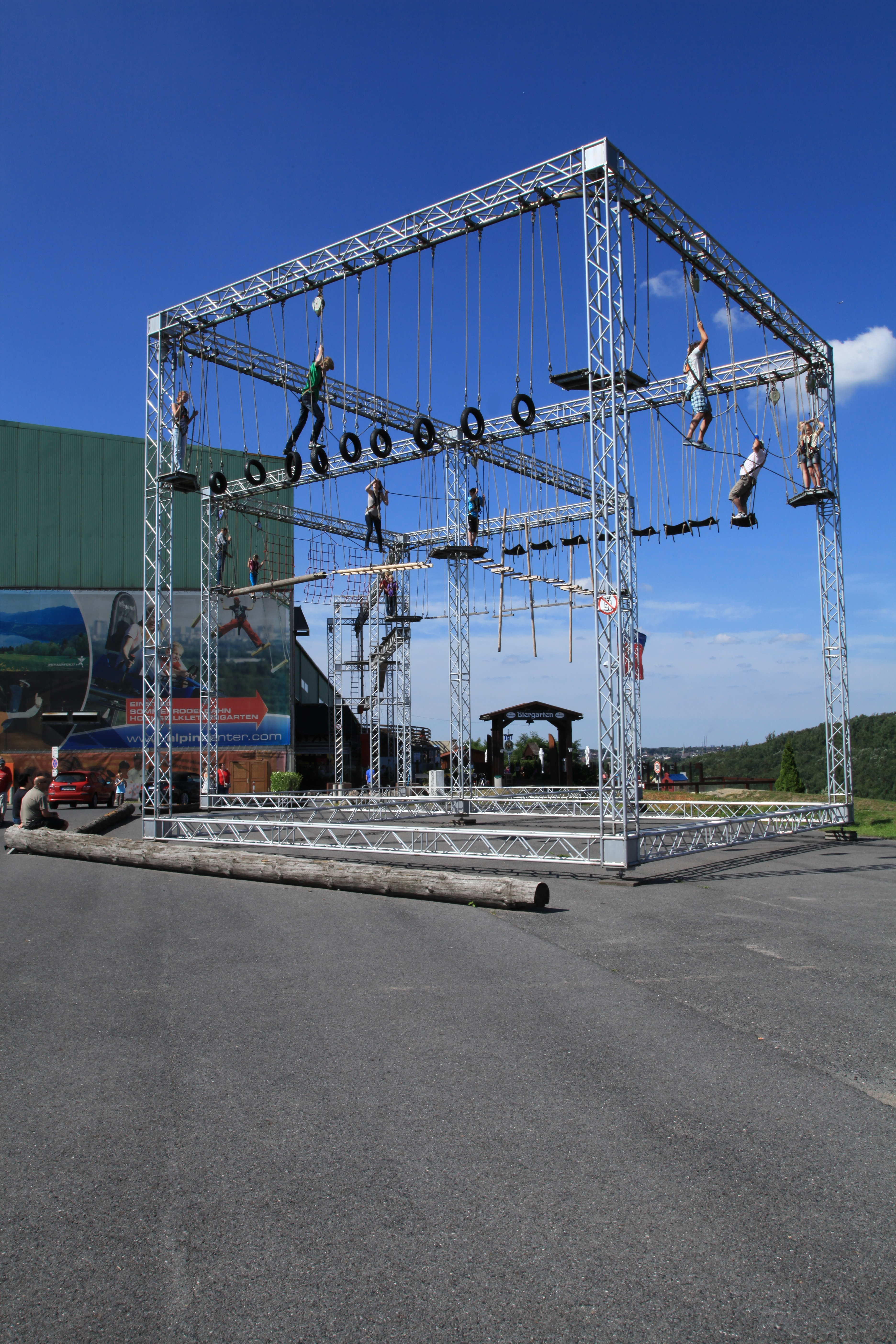 Hochseilklettergarten am Alpincenter auf der Halde Prosperstraße in Bottrop